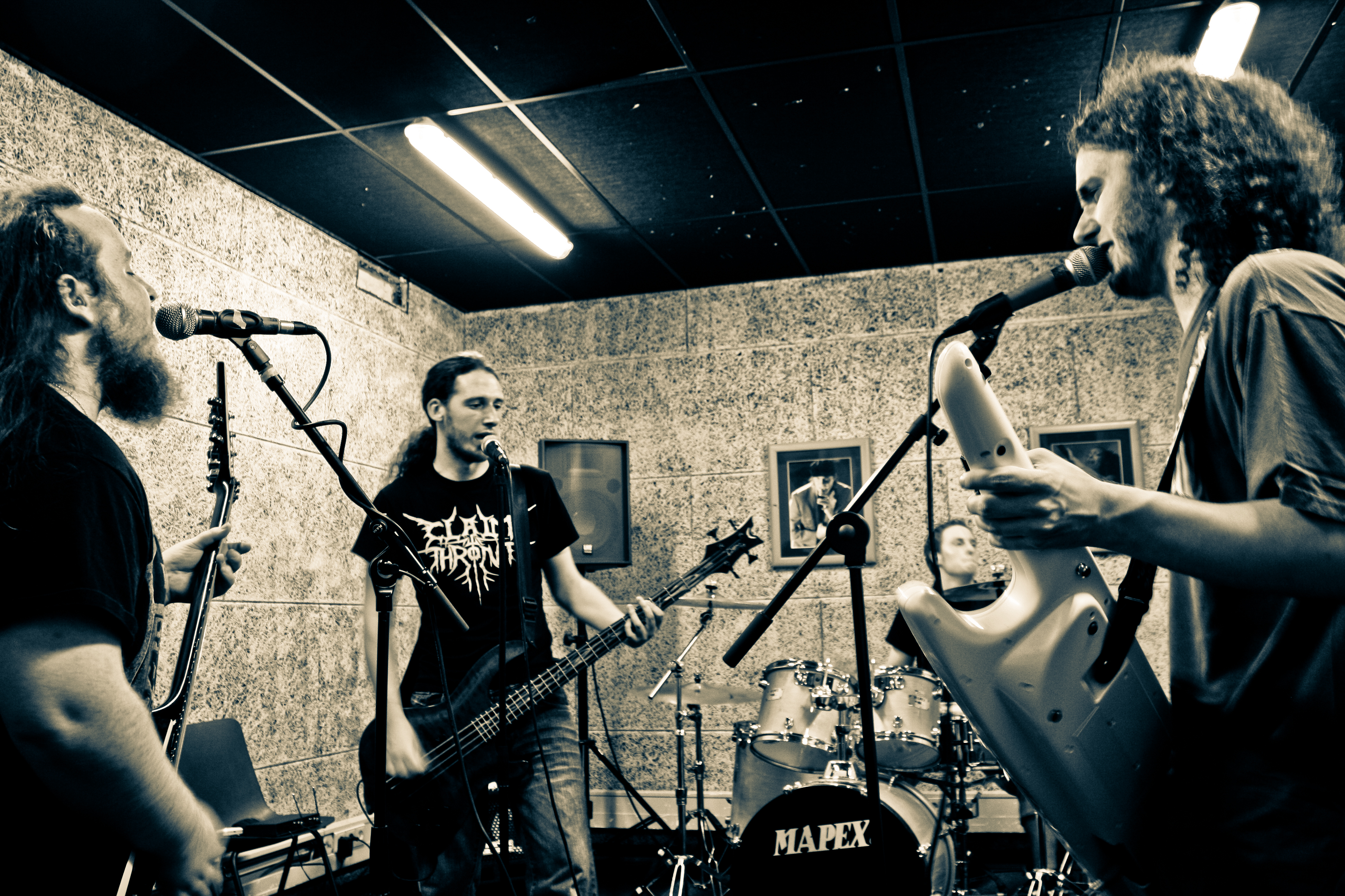 Alestorm